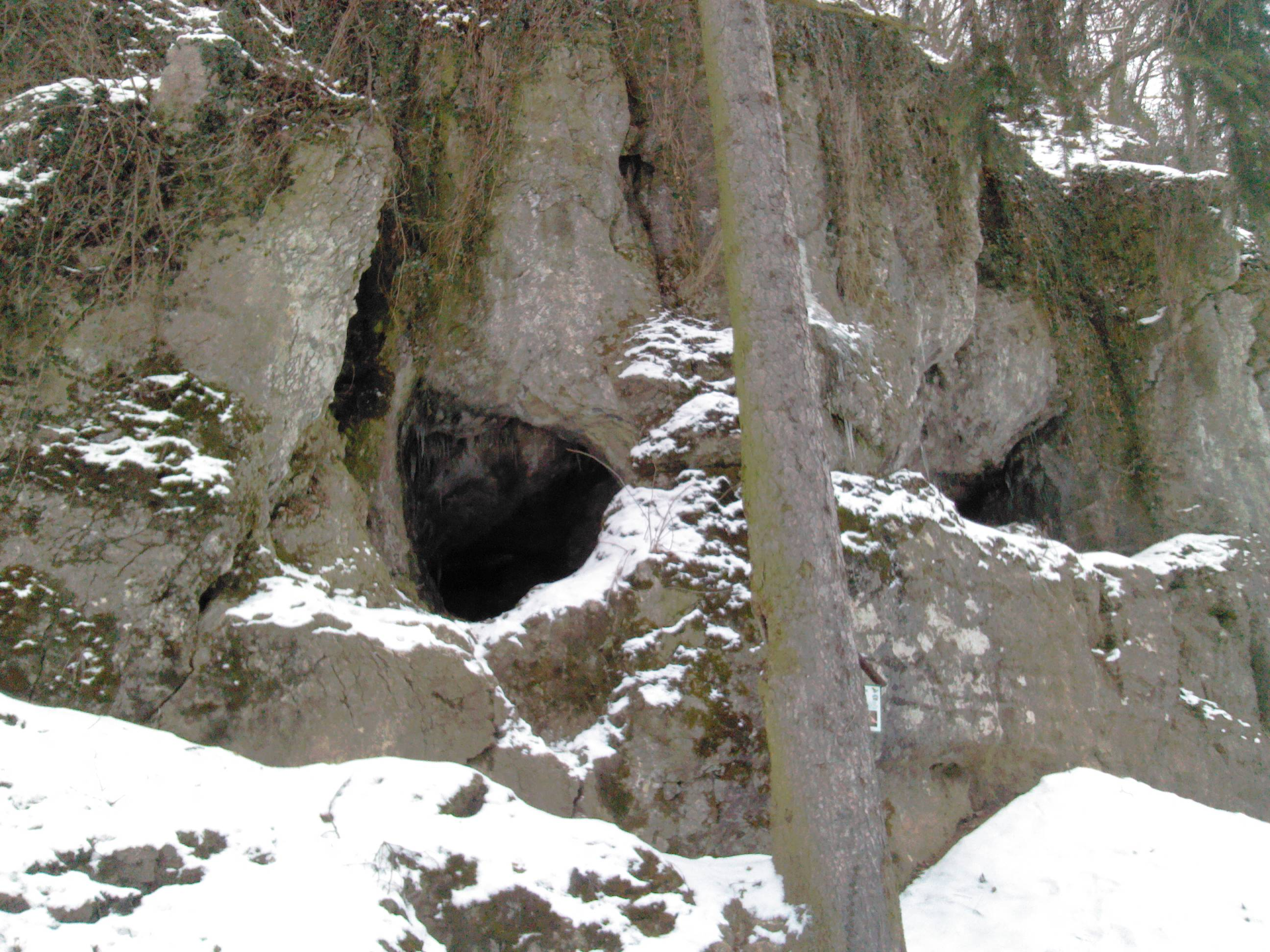 Jaskyňa nad cestou